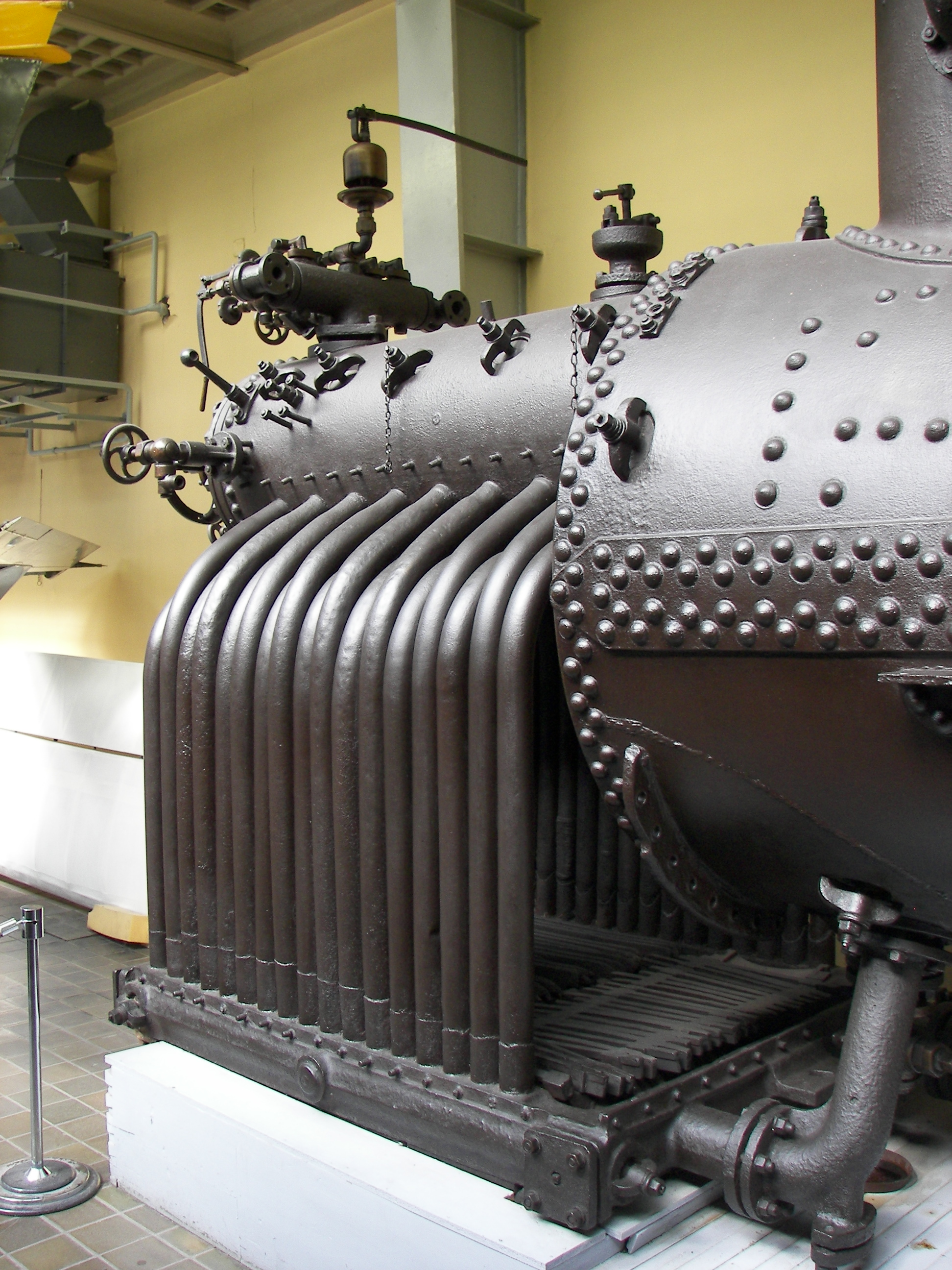 Brotan boiler for steam engine, exposition of Národní tecnické muzeum Praha